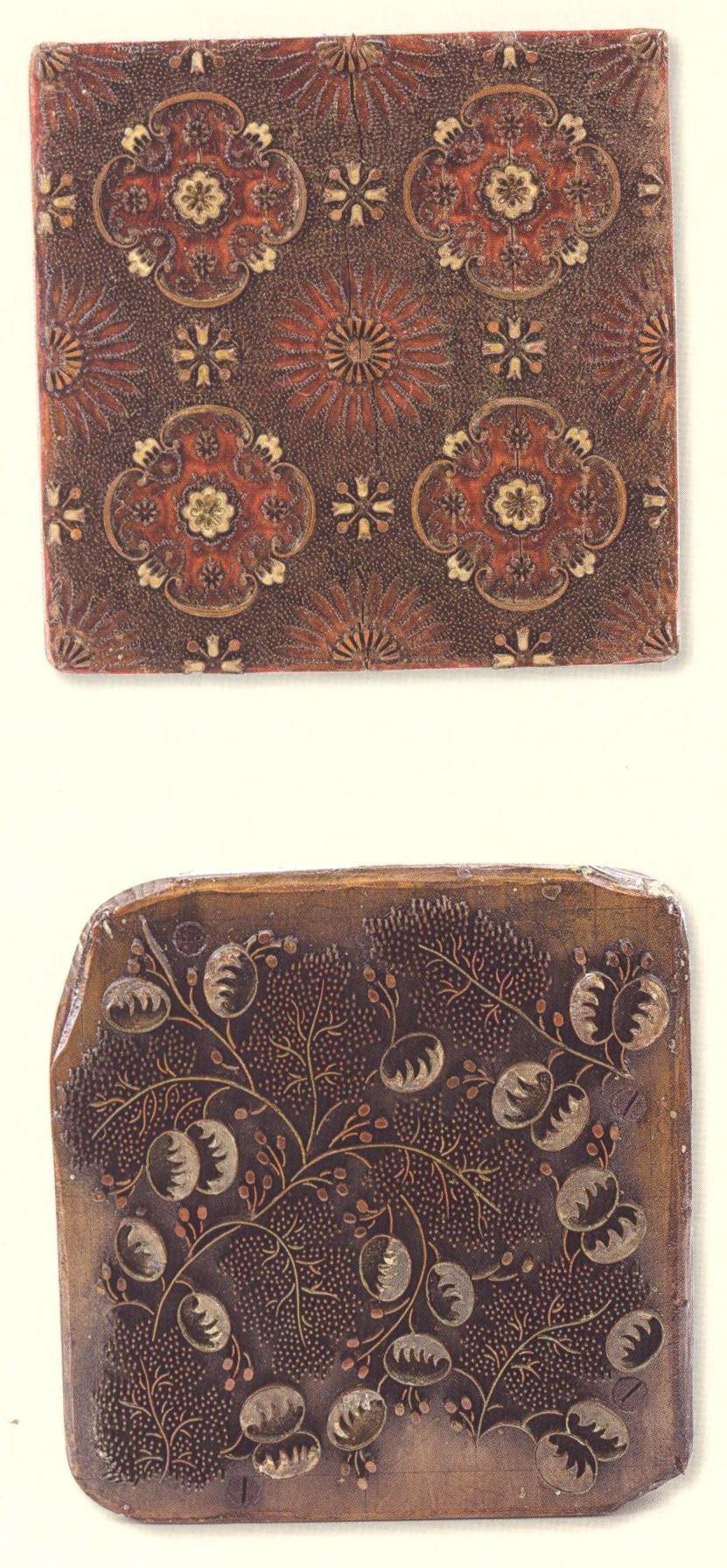 Elemír Montško - forma